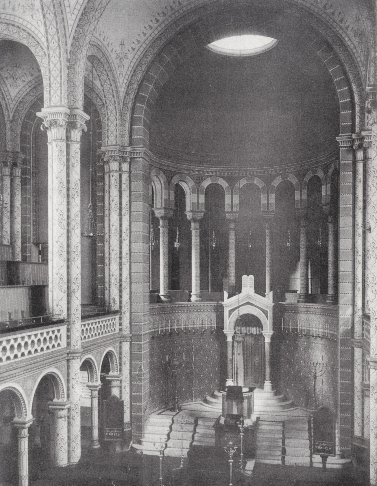 Braunschweig: Synagoge Innenraum (Foto von spätestens 1887). Brunswick, Germany: Synagogue Interior (picture taken in 1887 at the latest).